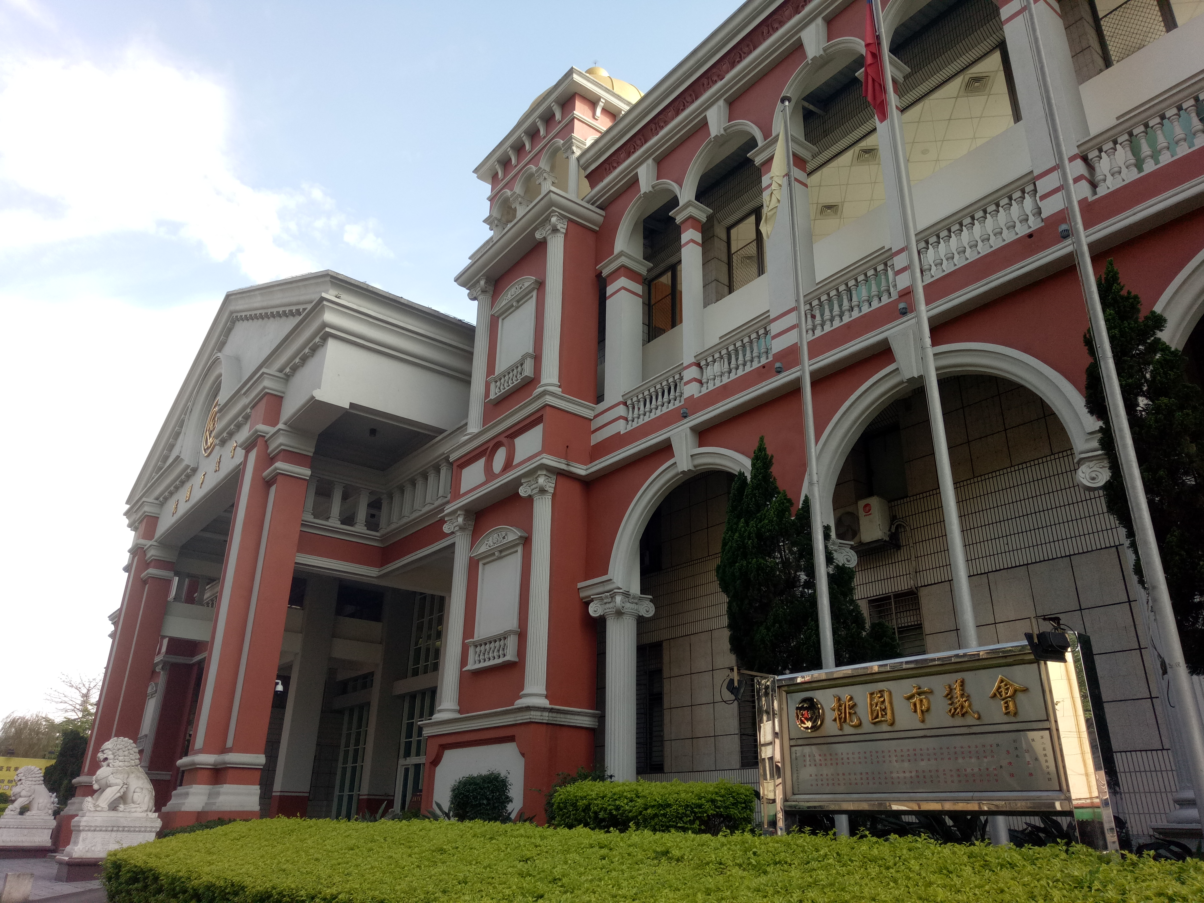 桃園市議會大樓。